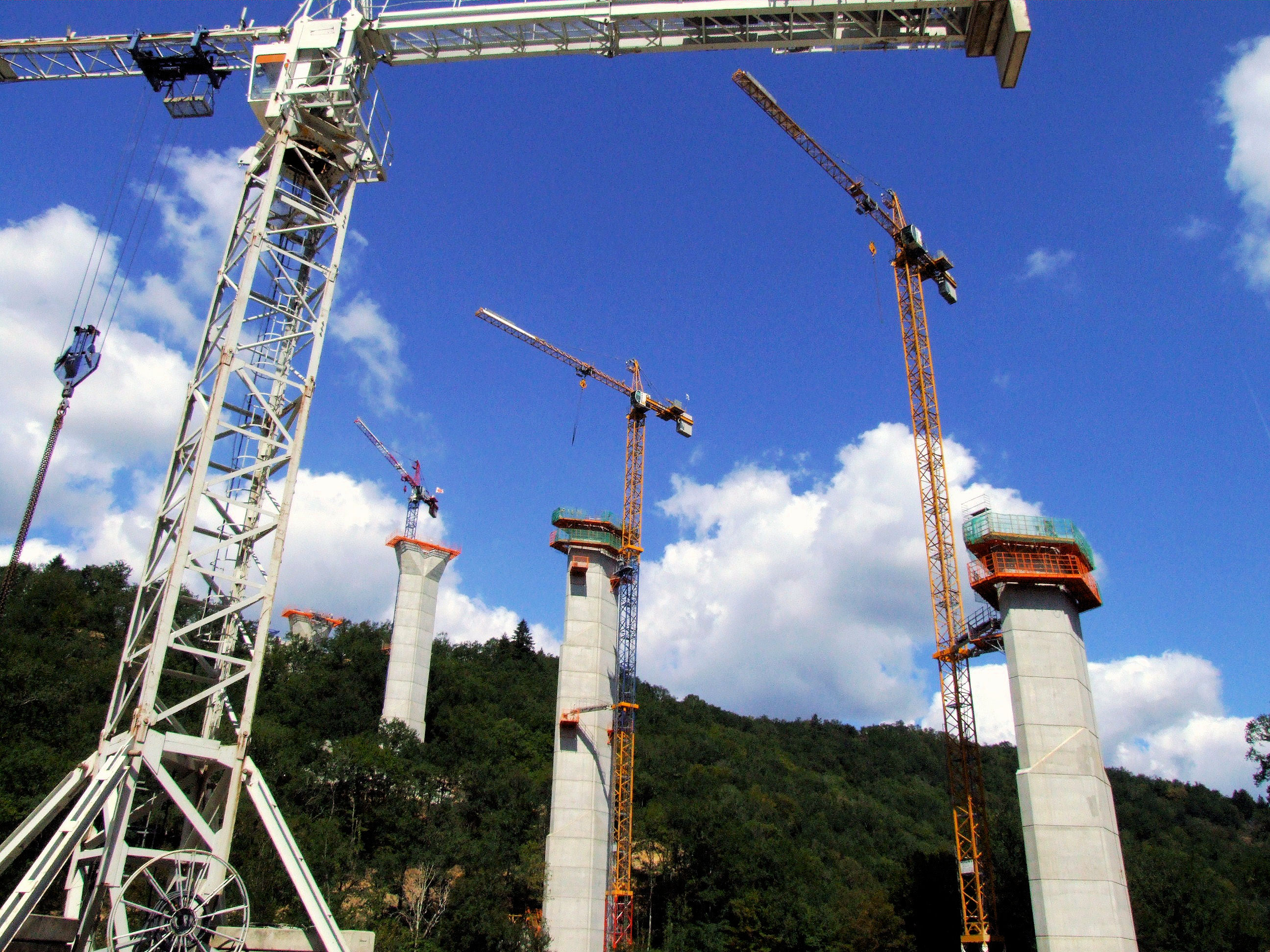 A89 - Viaduc de l'Elle - Réalisation des fûts de pile